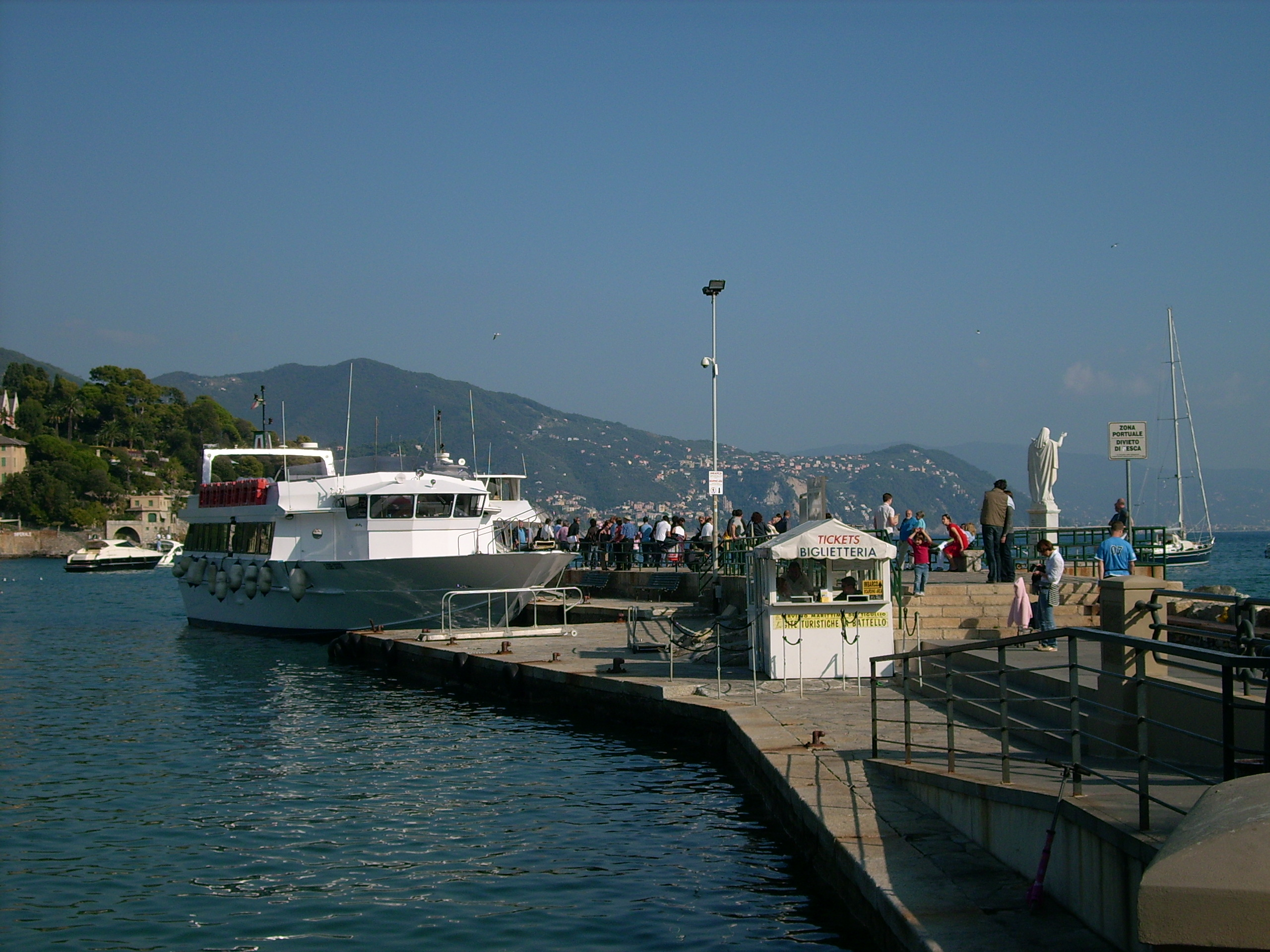 Santa Margherita Ligure, Liguria, Italia